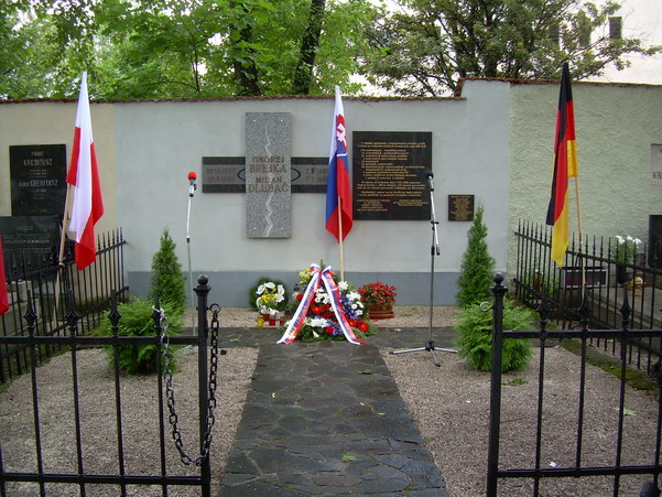 Pamätník usmrtených na hraniciach v r. 1948-1989 v Kežmarku